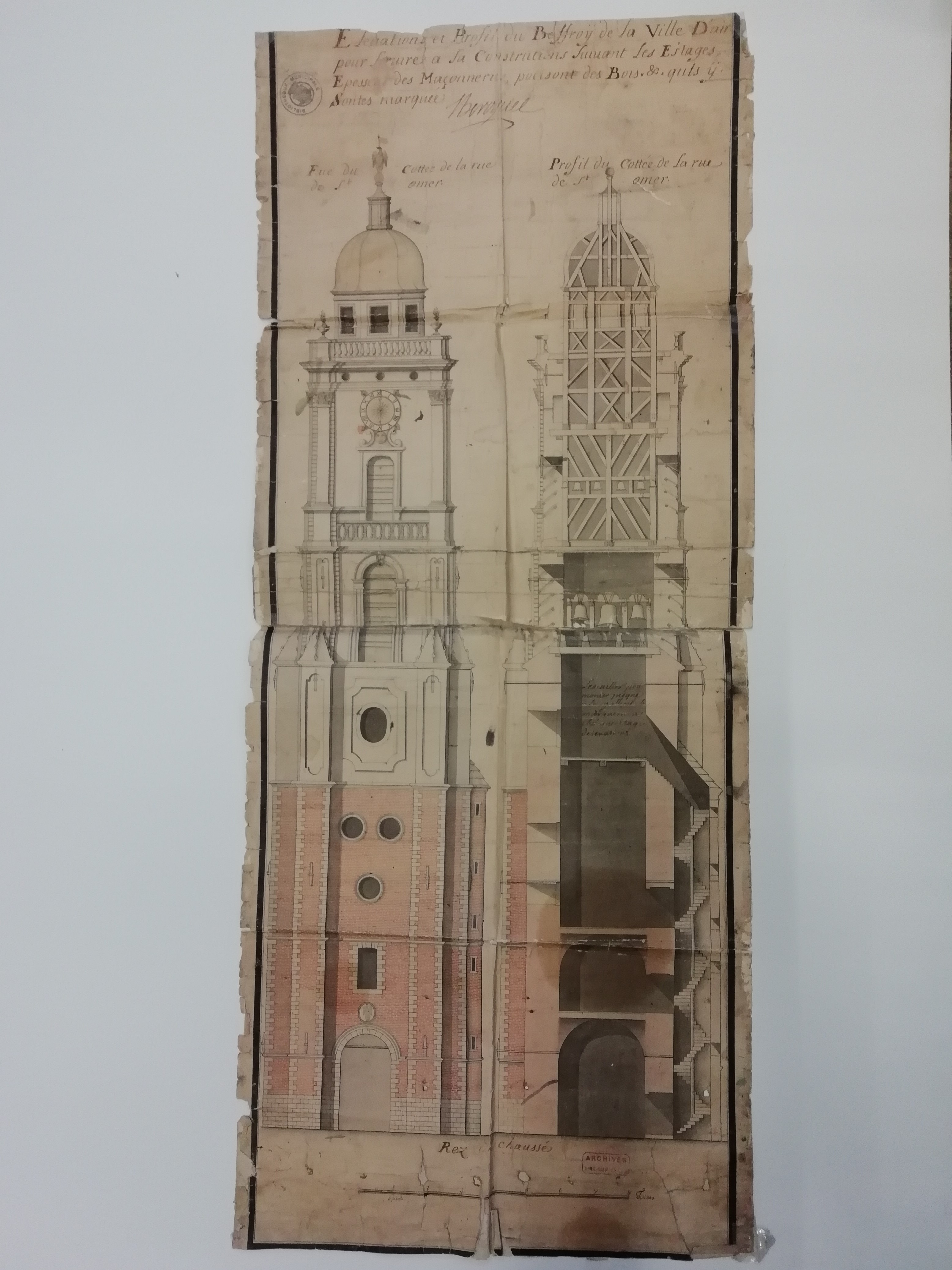 Plan du XVIII ème siècle de l'architecte Héroguel